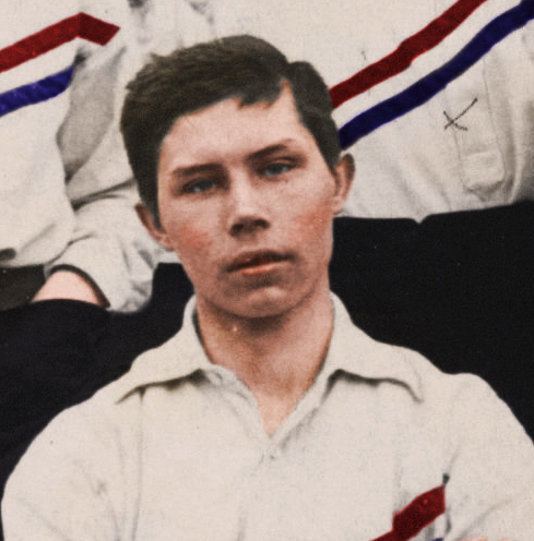 Foto van het Nederlands elftal voorafgaand aan zijn eerste interland, uit tegen België op 30 april 1905. Achterste rij: trainer Kees van Hasselt, Bok de Korver, Guus Lutjens, de Belgische official Paul Havenith, Ben Stom, Dolf Kessler, Peet Stol, Eddy de Neve, grensrechter Bep Willing. Voorste rij: Reinier Beeuwkes, Karel Gleenewinkel Kamperdijk, Rein Boomsma, Dirk Lotsy, Willy de Vos.